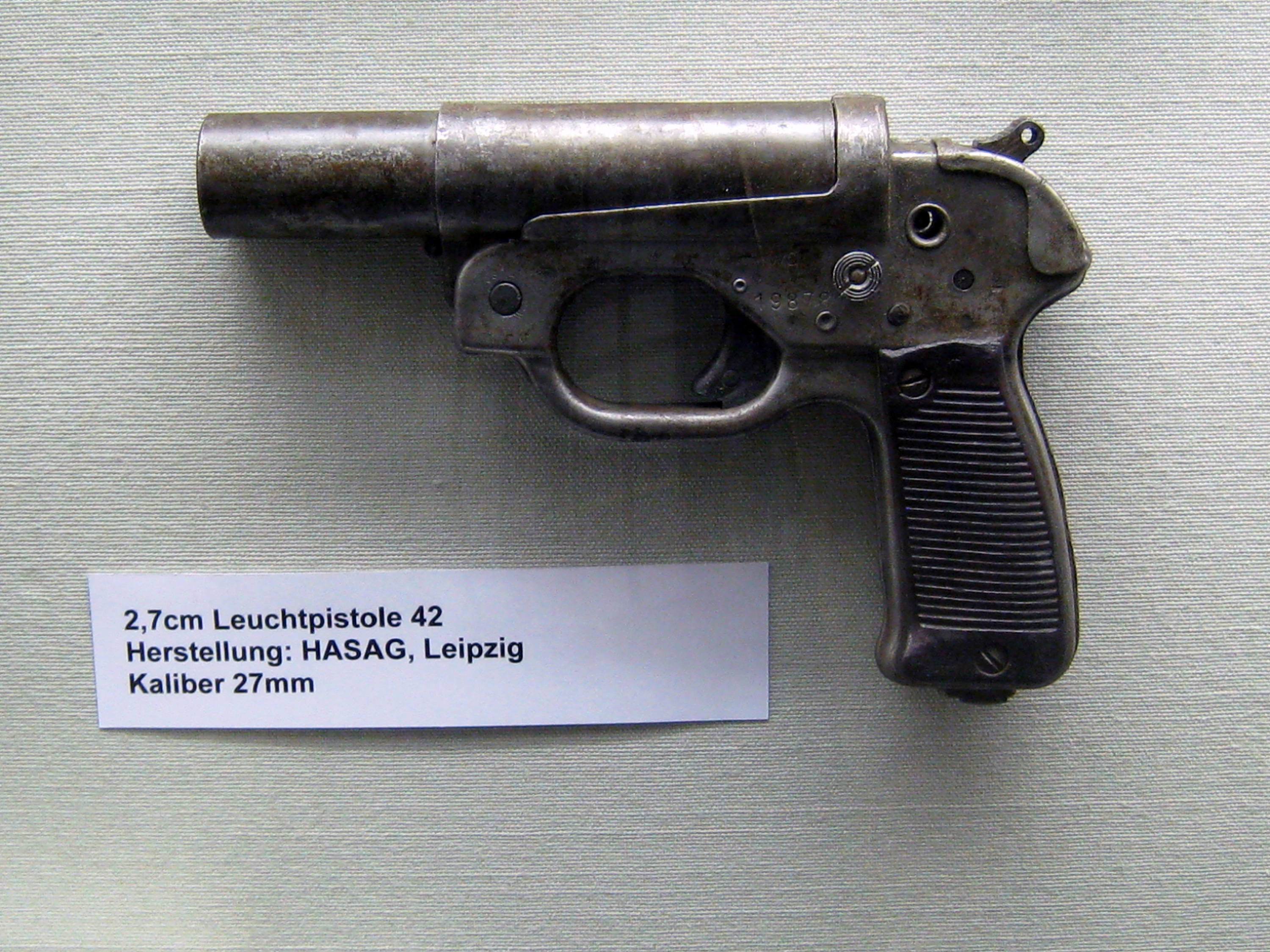 Waffensammlung im Festungsmuseum Reuenthal